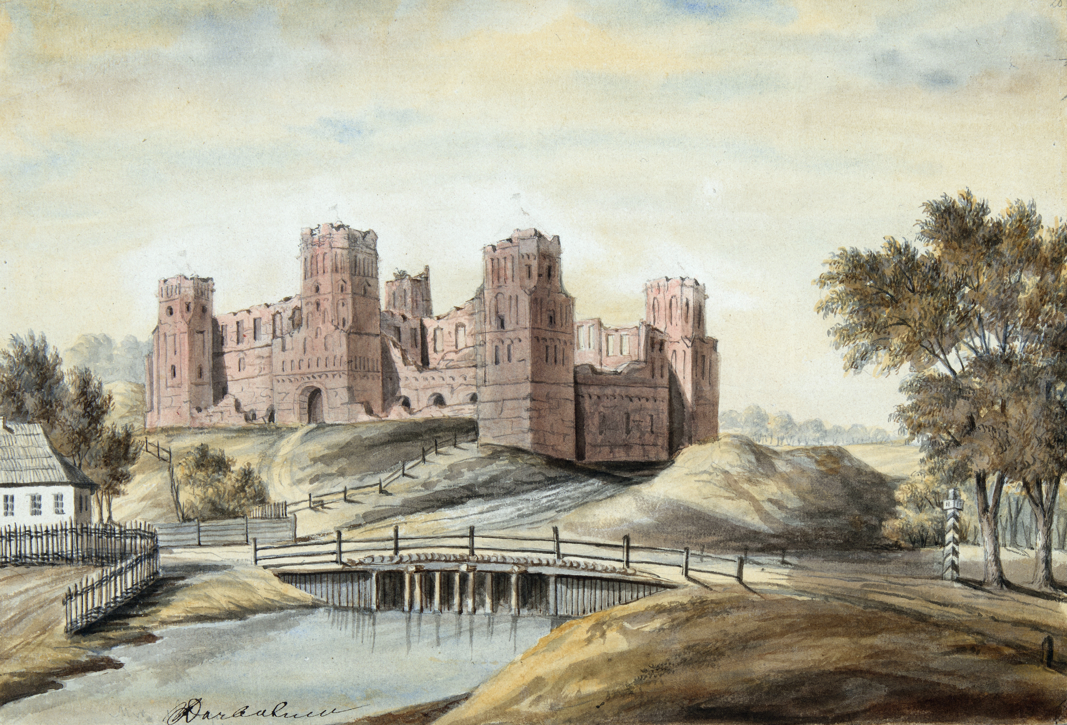 Беларуская (тарашкевіца): Мір (Mir). Замак Ільлінічаў і Радзівілаў (Illinič-Radzivił)